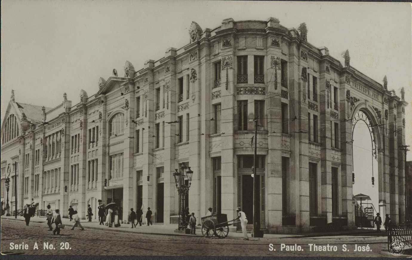 Theatro São José entre 1905 e 1910